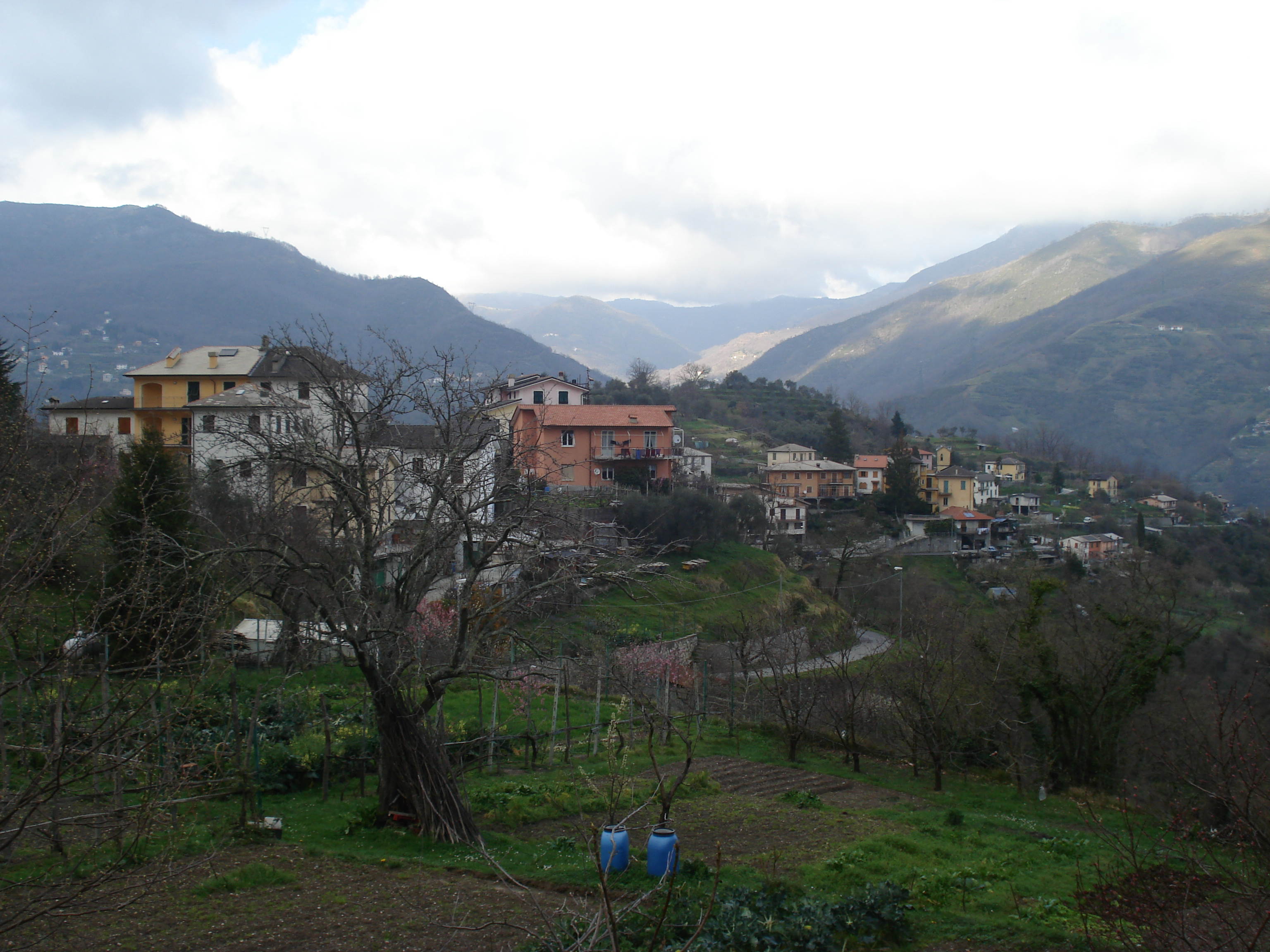 Cosmin latan,16-03-2008,Tribogna